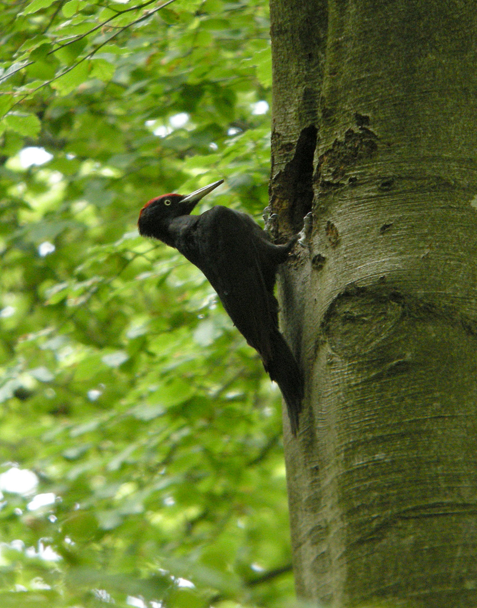 Dryocopus martius, Staatswald Rocherath, Ostbelgien